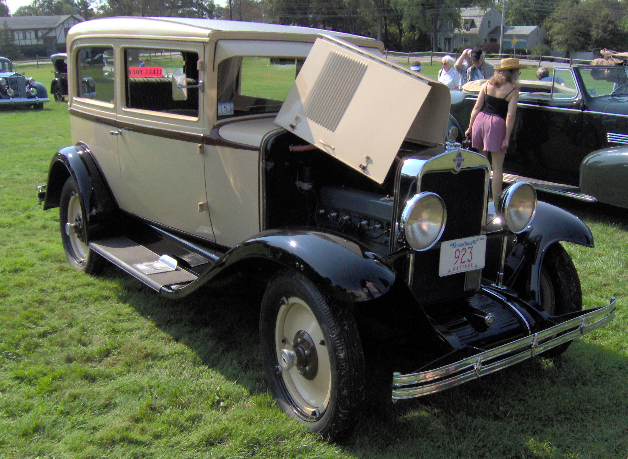 1929 Chevrolet International 2-door sedan